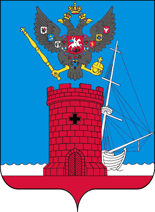 Герб городского округа Феодосия, утверждённый в 2016 году